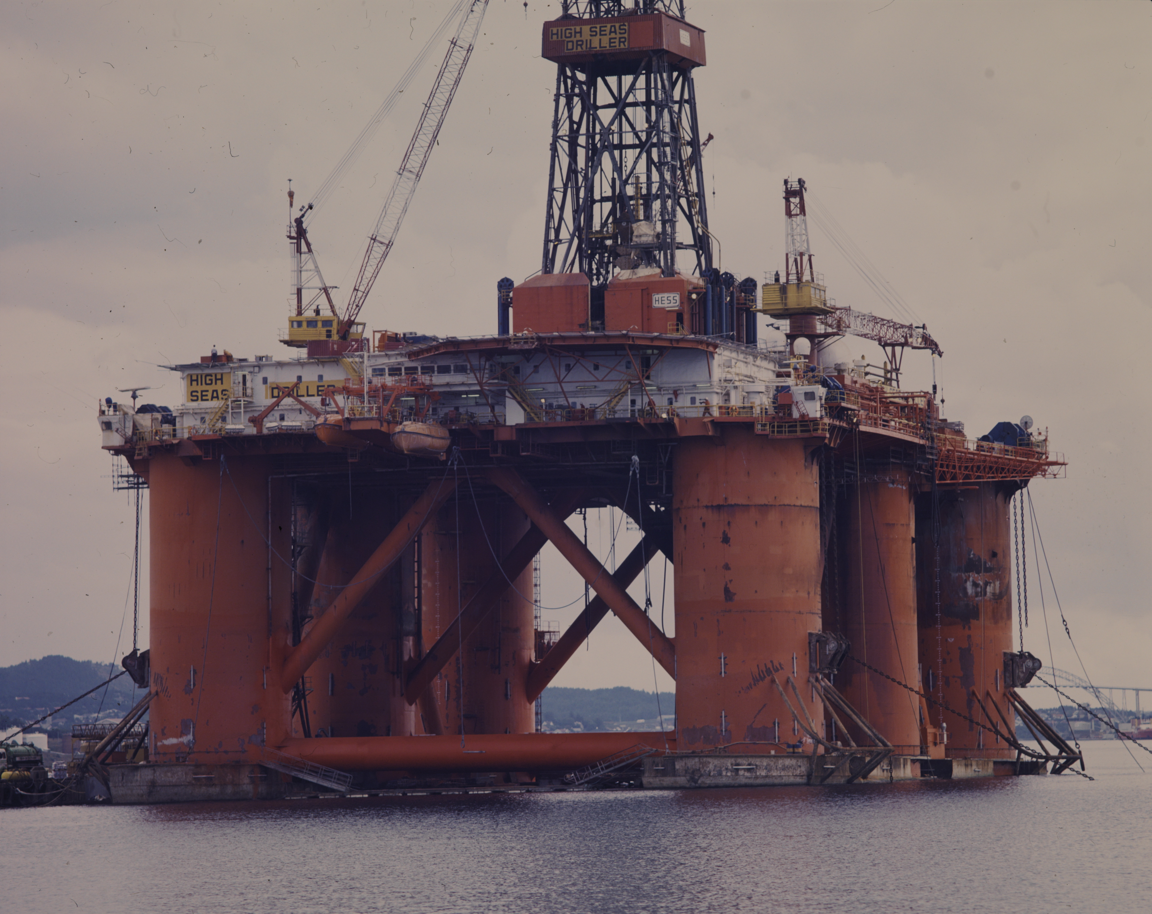 Oljeriggen High Seas Driller i Stavanger